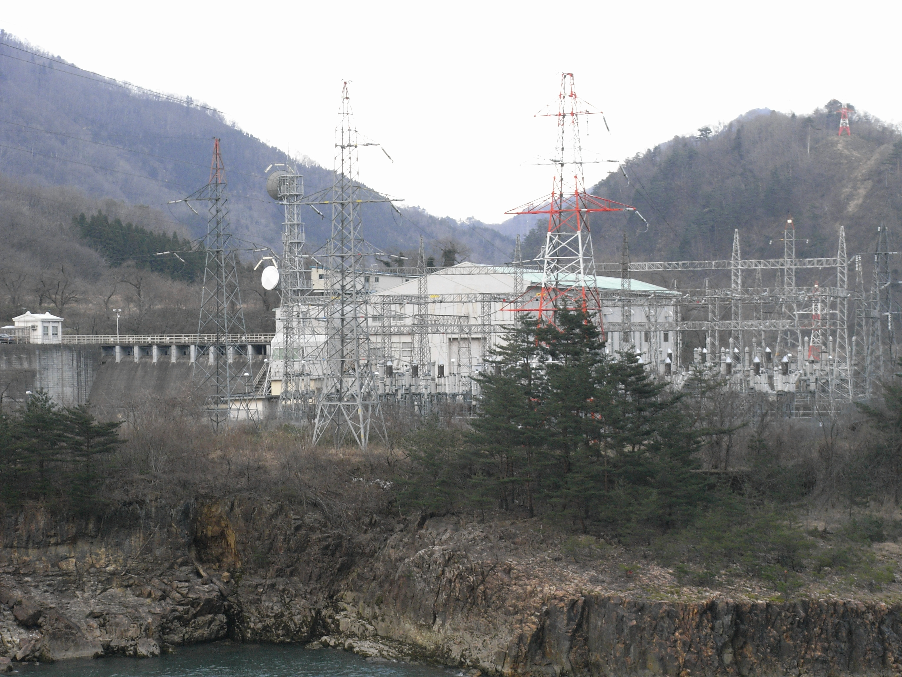 power station